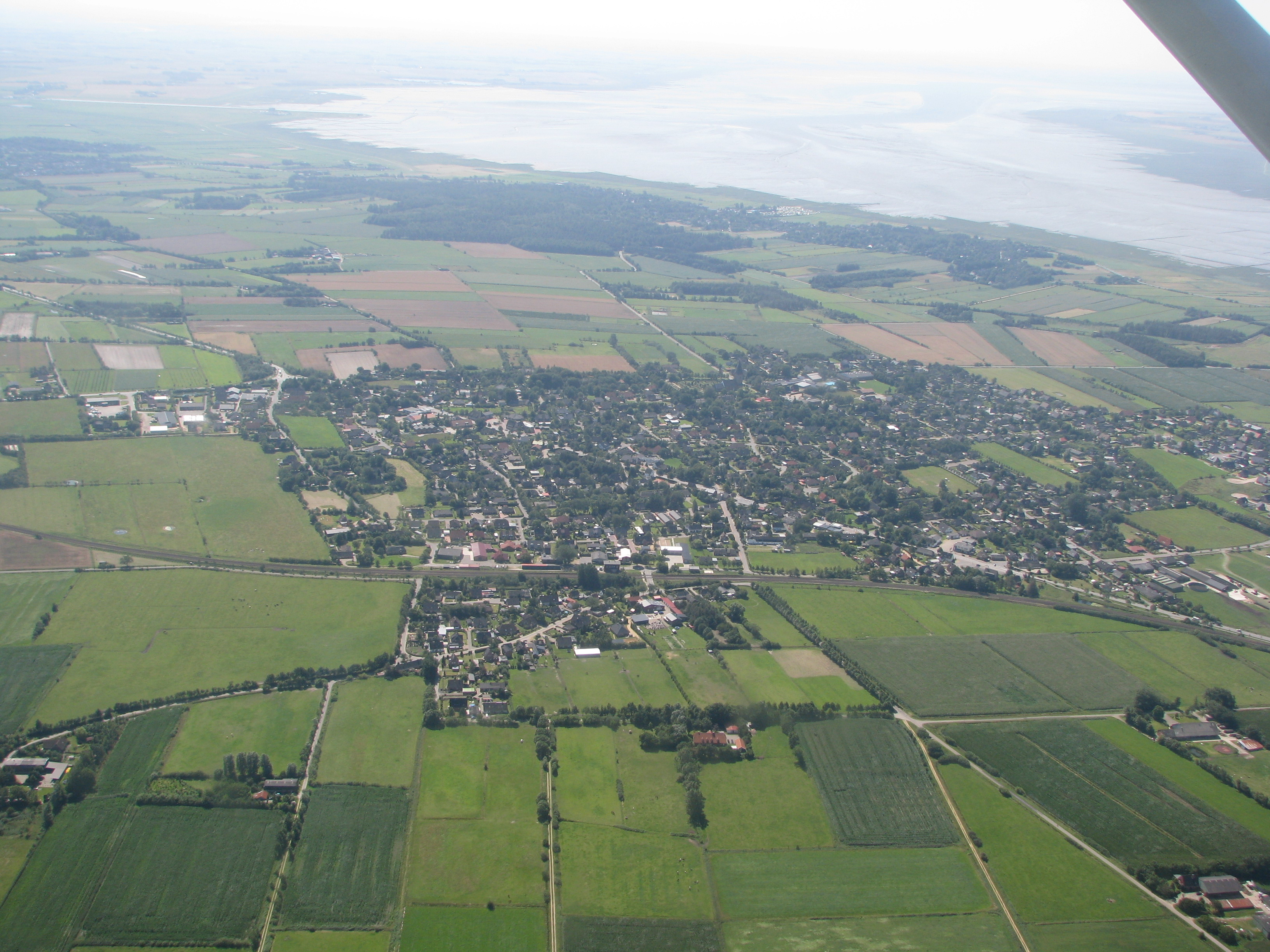 Luftbild auf den Ortskern der Gemeinde Hattstedt von Nordosten